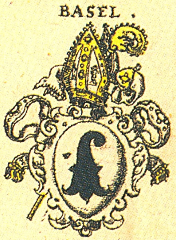 Wappen des Bistums Basel nach Siebmachers Wappenbuch